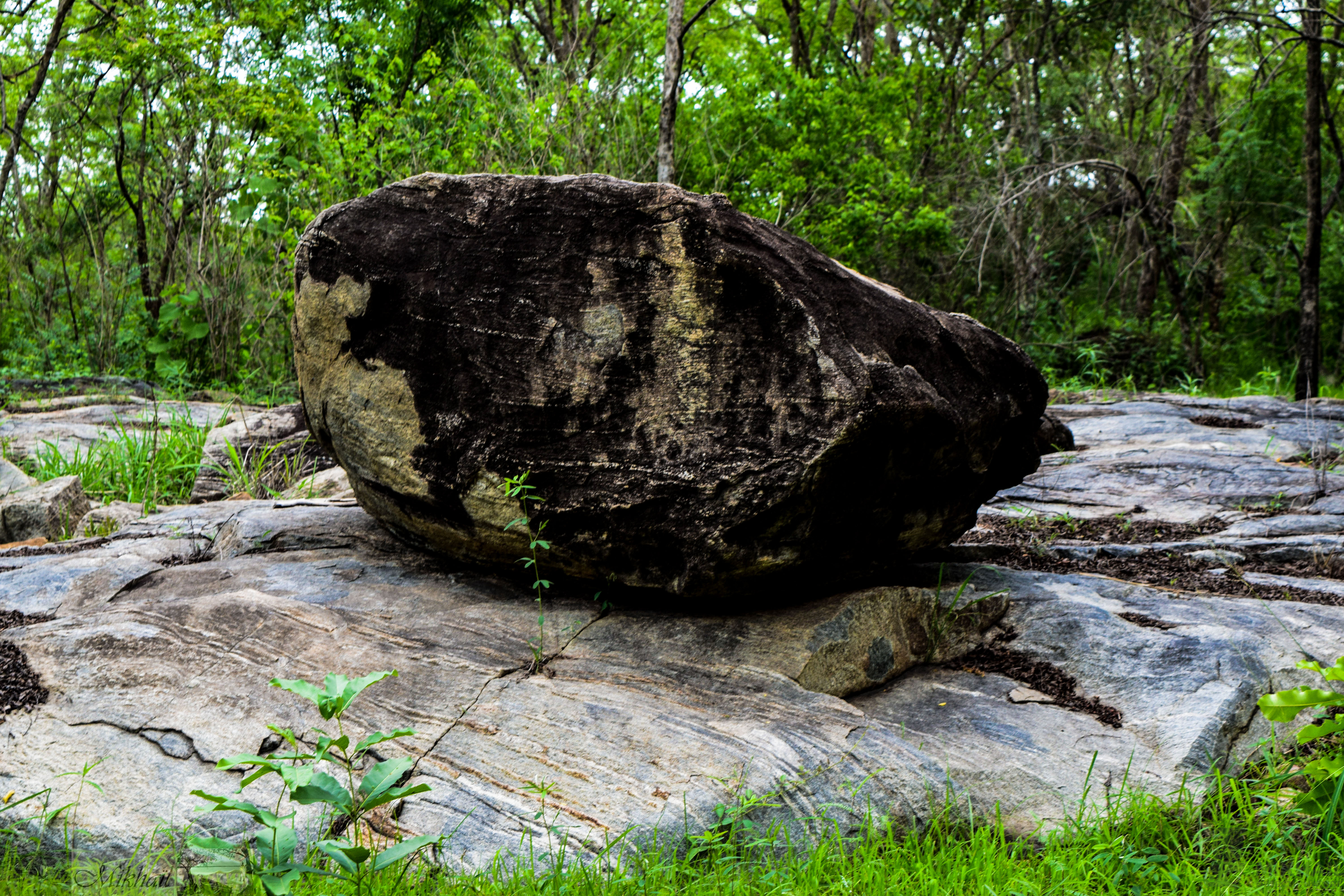 Roches dans le pâturage naturel de Samiondji (Covè)